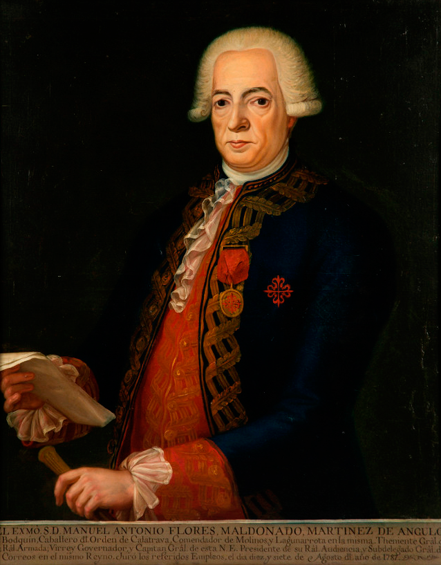 Retrato del virrey Manuel Antonio Flórez Maldonado (c.1722-1799)